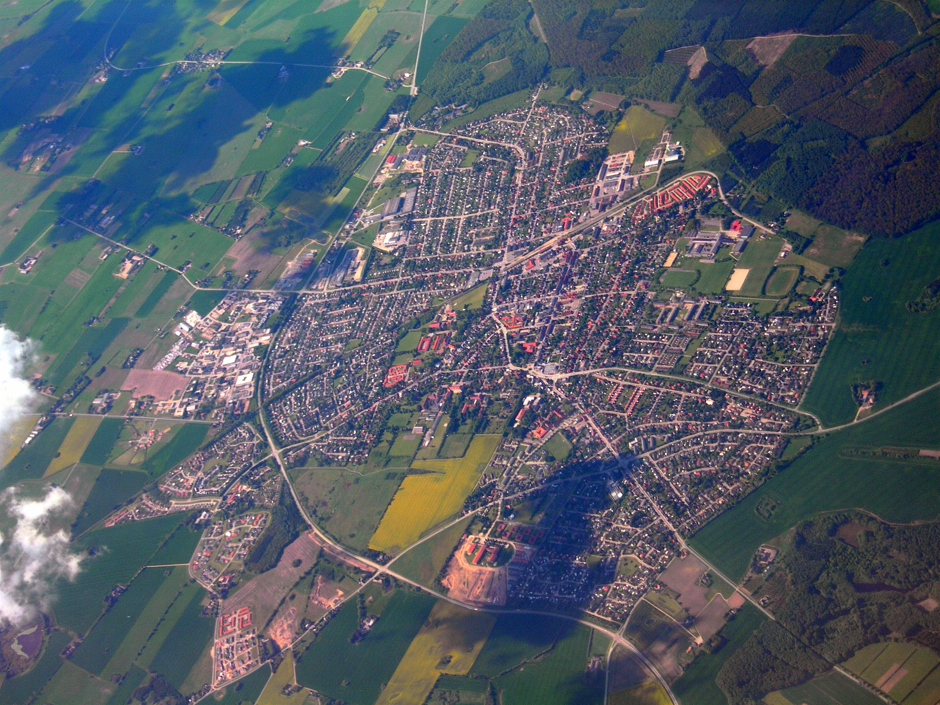 Haslev fra oven.